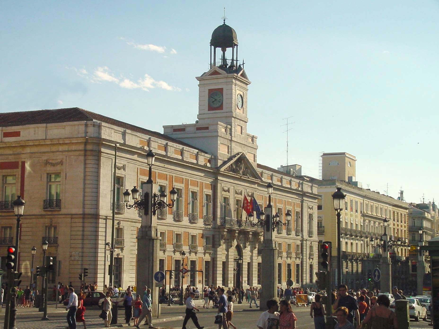 Vista lateral de la Puerta del Sol de Madrid